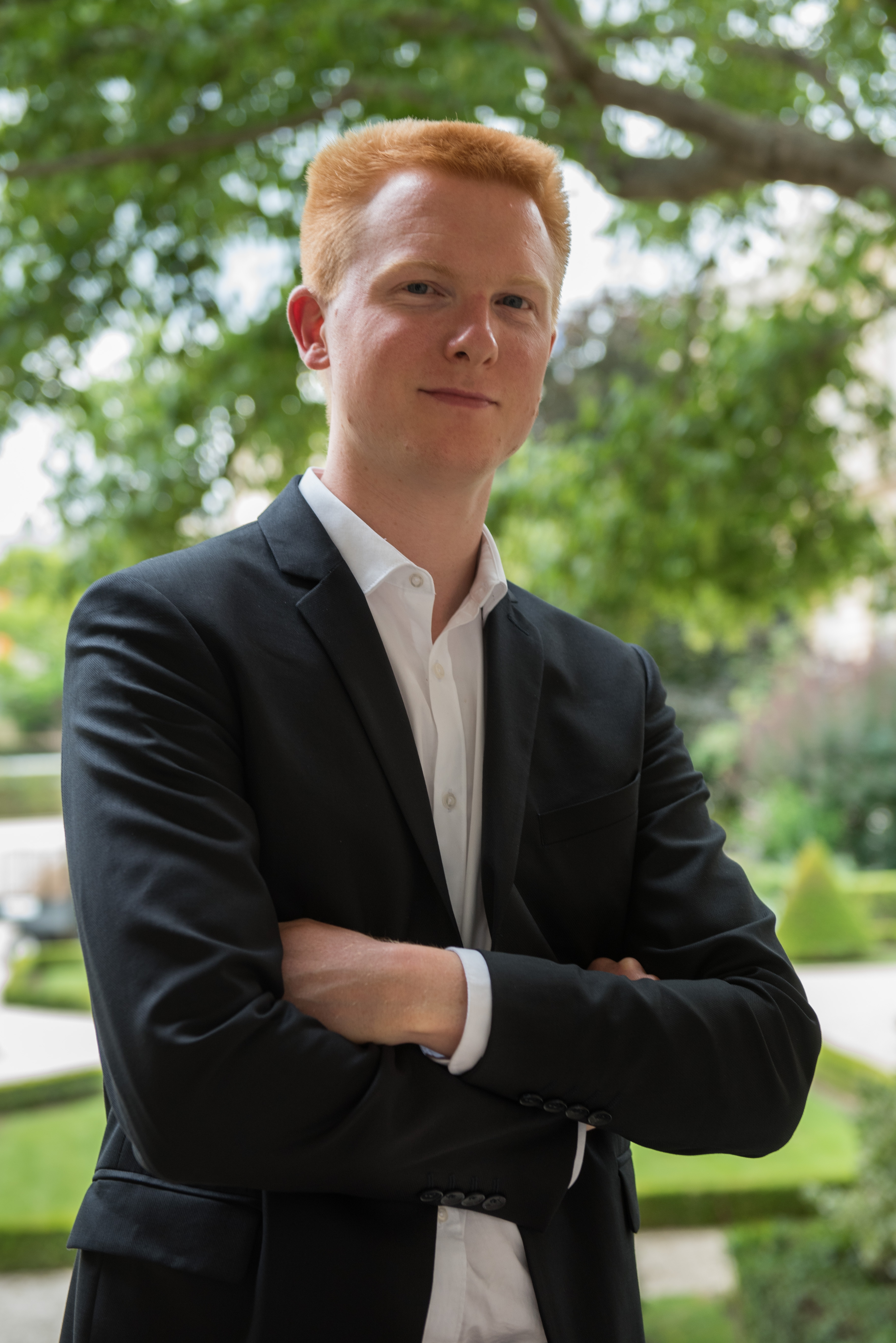 Adrien Quatennens dans le jardin des Quatre colonnes du palais Bourbon en 2017.